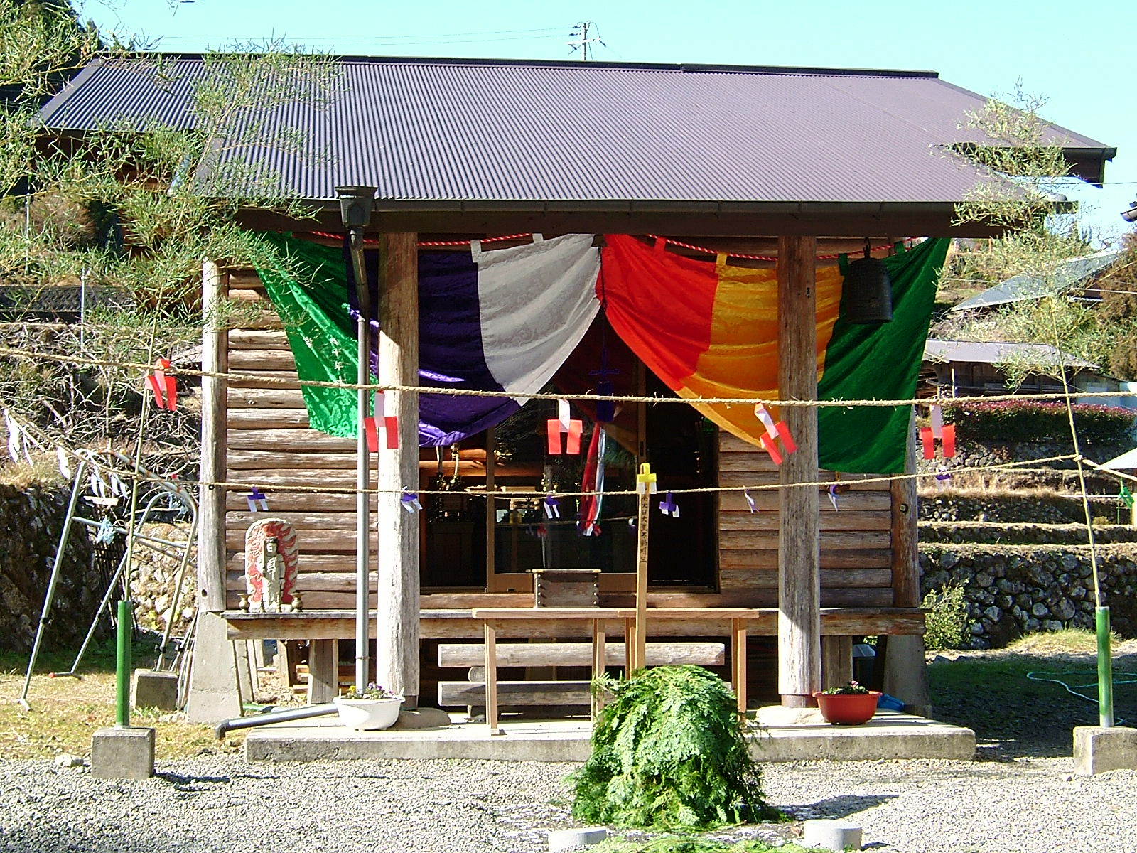 総本山金峯山寺修験本宗「普来山正覚院｣本堂